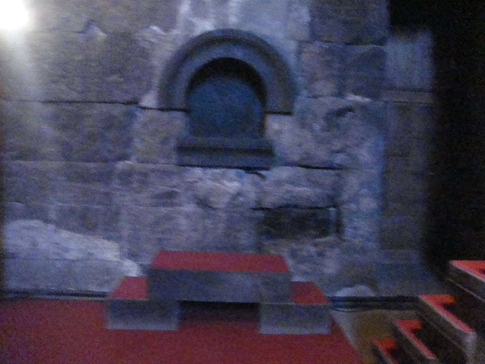 խորան